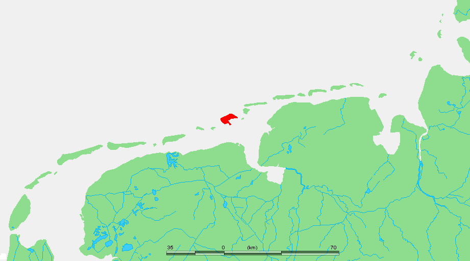 Wadden - Borkum.PNG